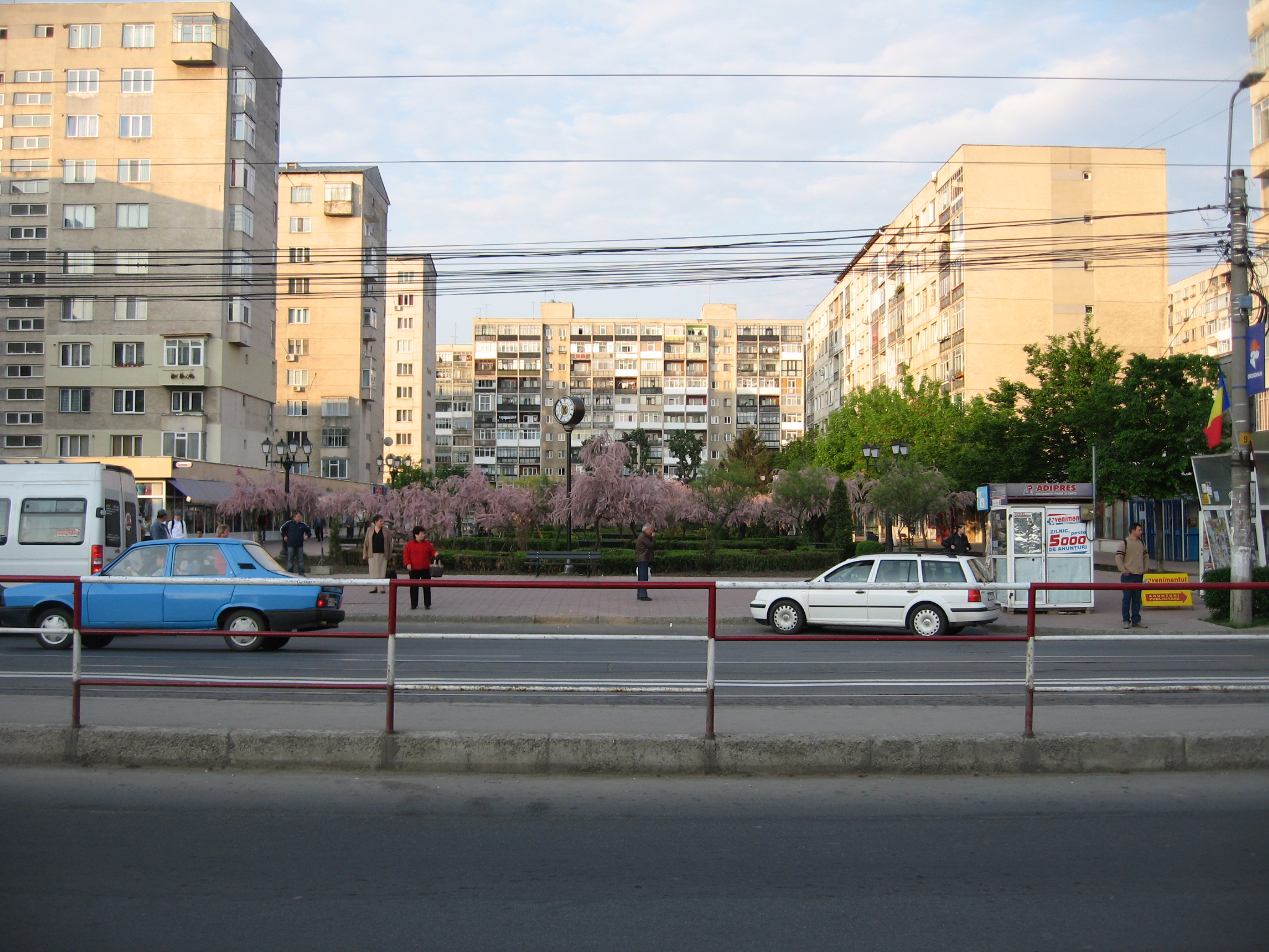 vezi denumirea